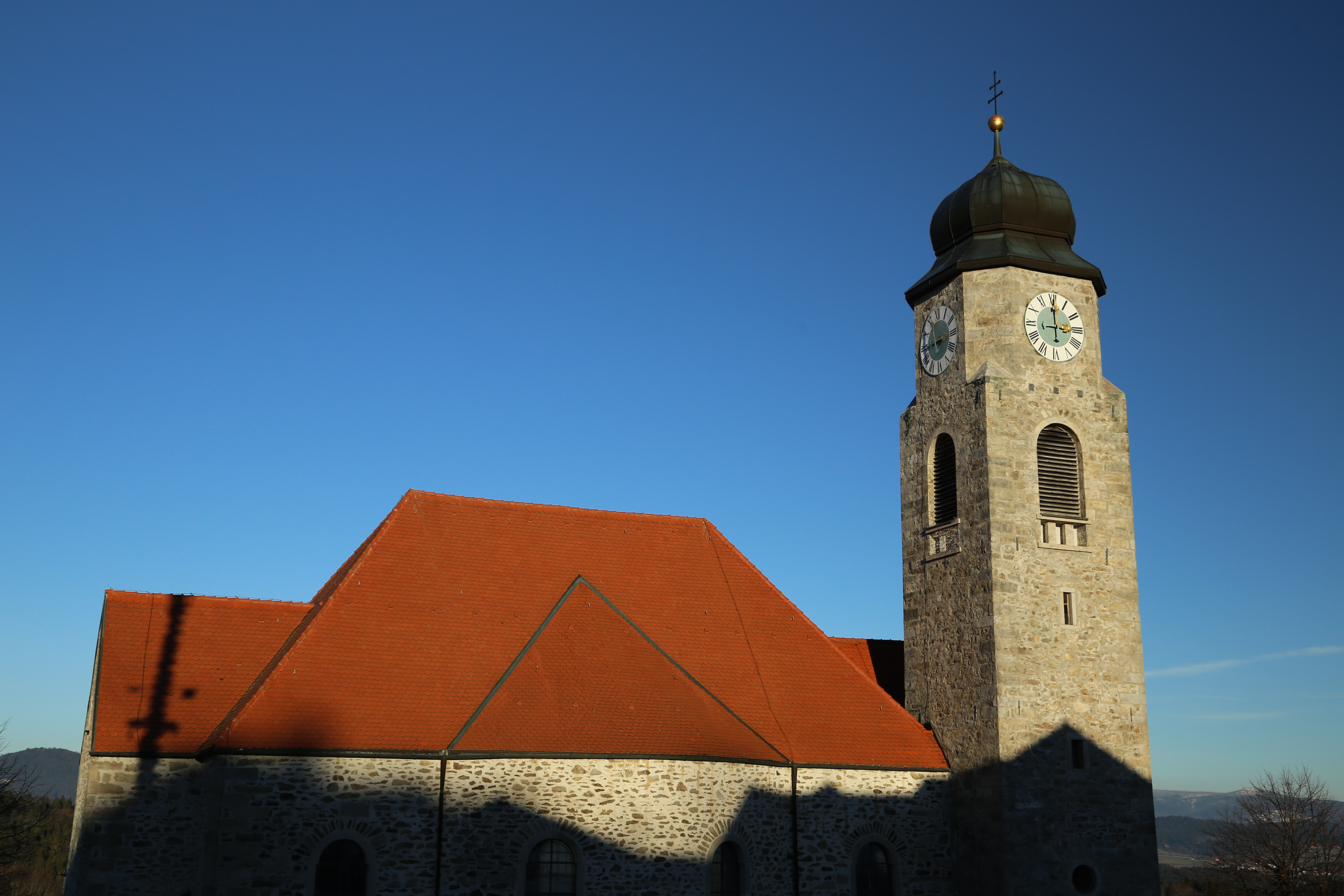 Pfarrkirche Maria Heimsuchung in Untermitterdorf